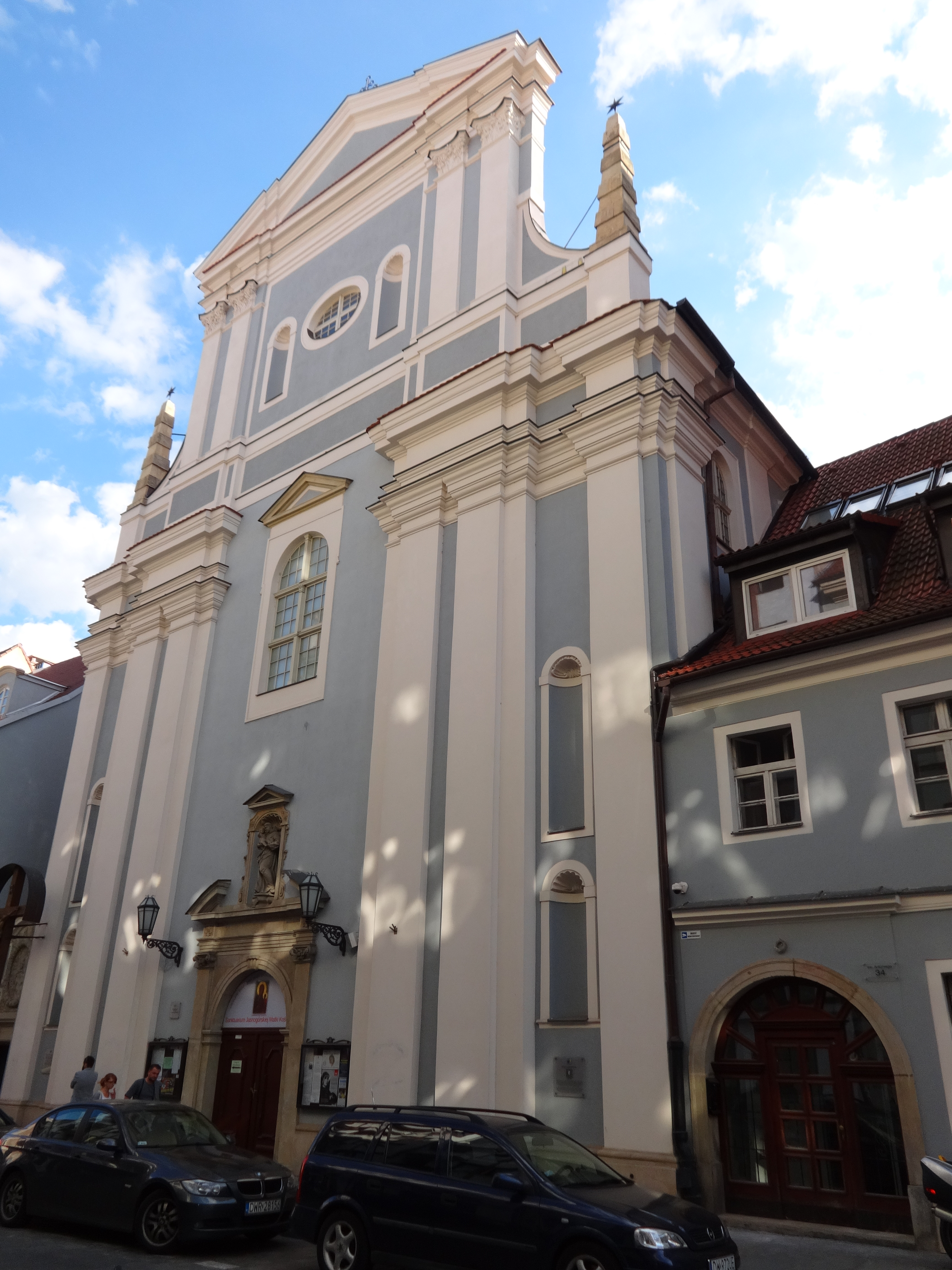 Wrocław, zespół klasztorny elżbietanek